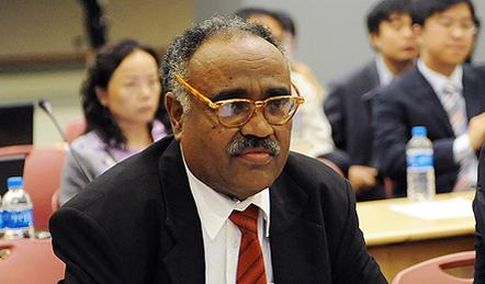 Ismail Elgizouli à la 32ème session du GIEC à Busan en 2010.